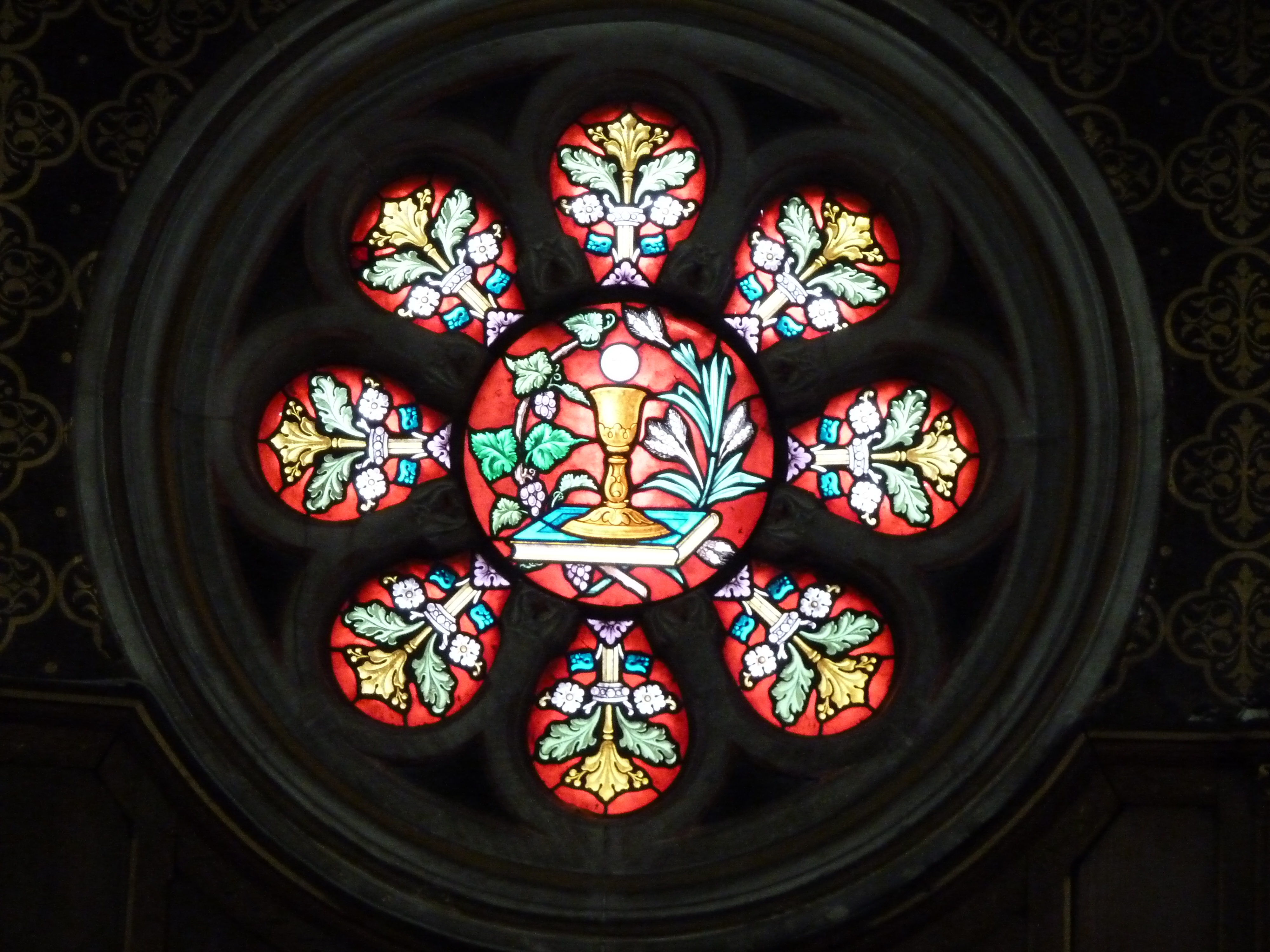 Cirey-sur-Vezouze maison de retraite vitrail de la chapelle